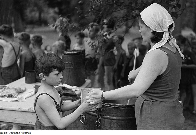 Original image description from the Deutsche Fotothek Junge lässt sich einen Topf Suppe geben